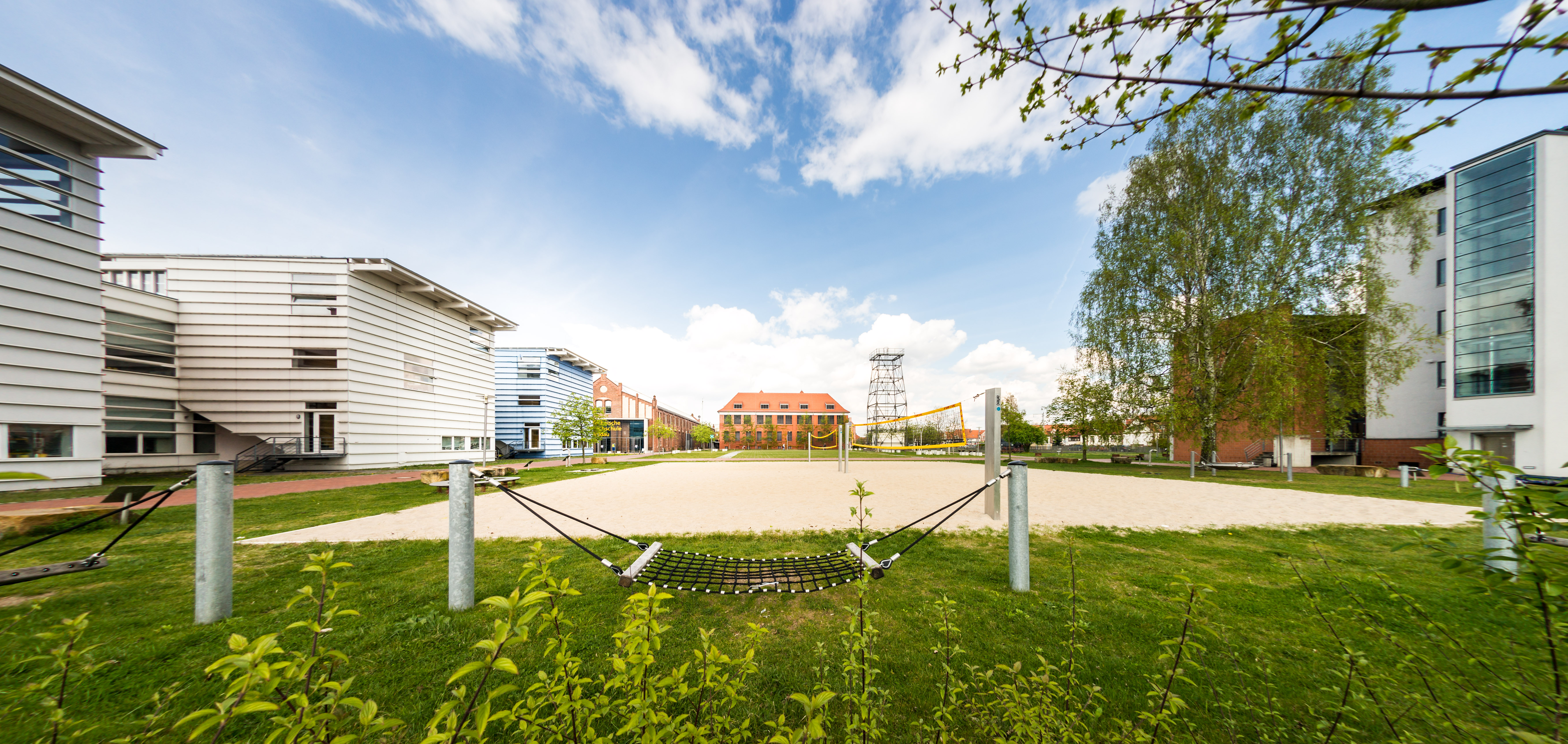 Fotograf: Matthias Friel